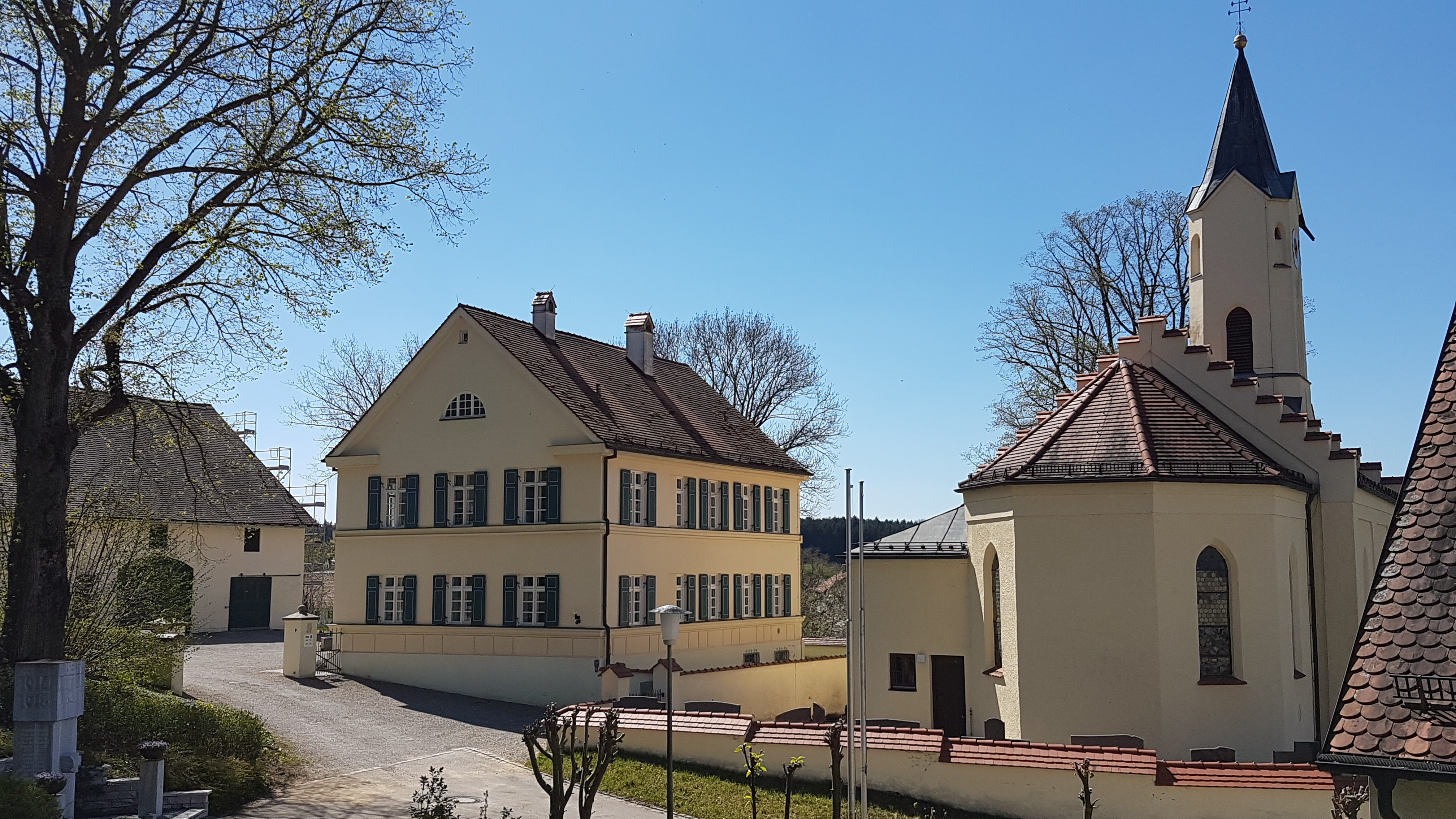 Hirschenhausen (Jetzendorf), ehemaliger Pfarrhof und Pfarrkirche Hirschenhausen